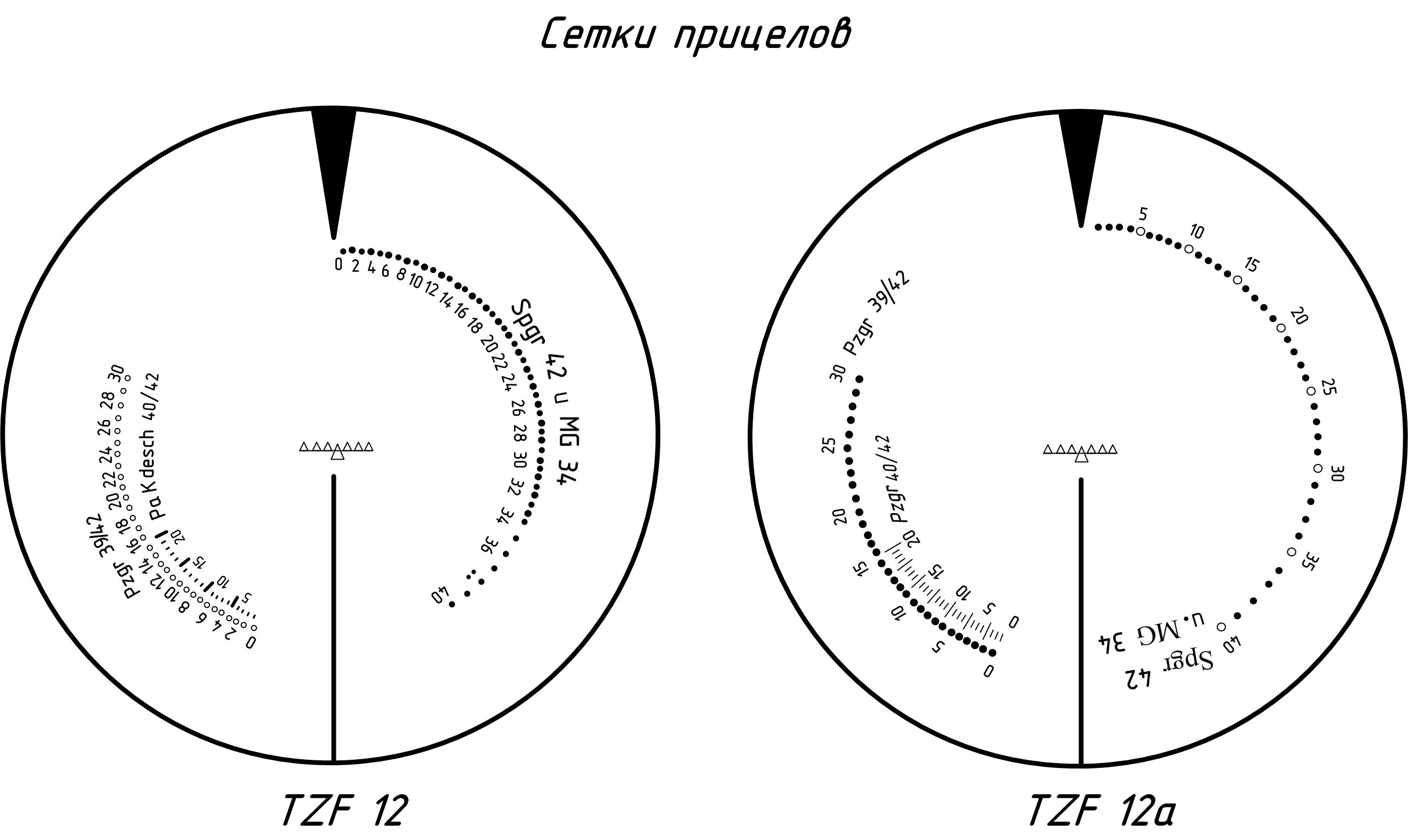 Сетки прицелов ТЗФ12 и 12а